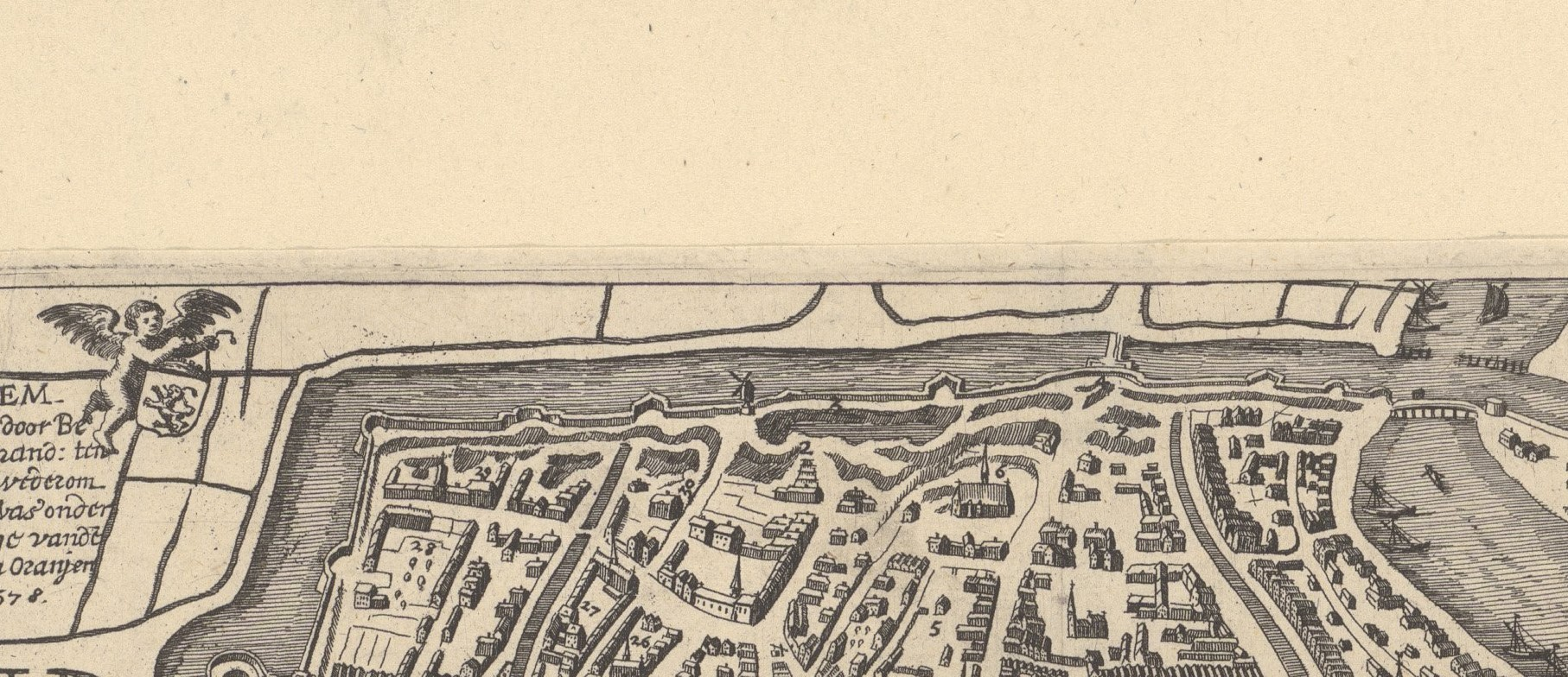 Uitsnede van de kaart van Haarlem van Pieter Saenredam 1628 voorstellende de situatie na het Beleg en de Brand van Haarlem,1578 (kopie van de kaart van Thomas Thomaszoon 1578) , noordelijke gracht, Kruispoort, Janspoort